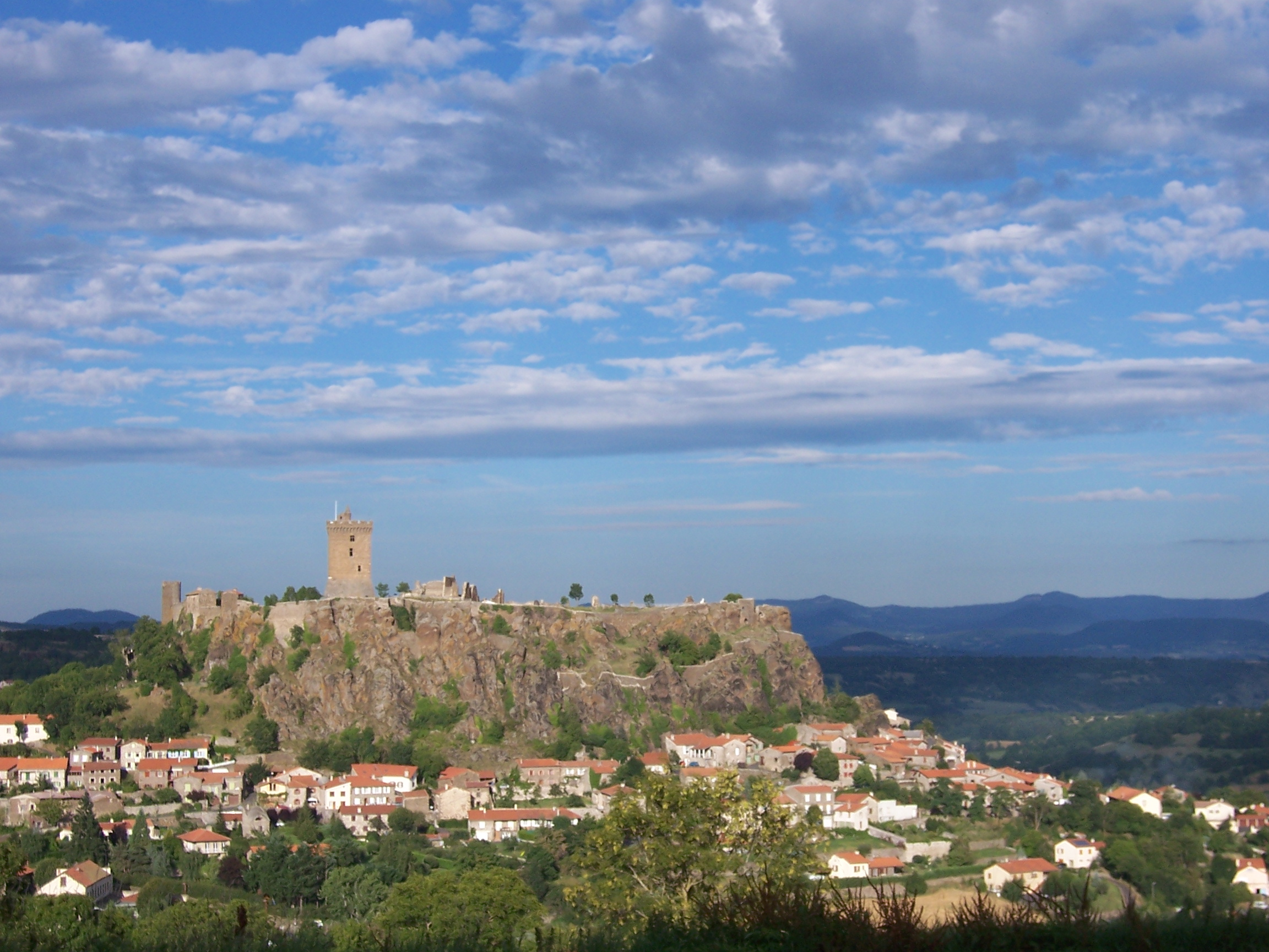 Vue du château de Polignac